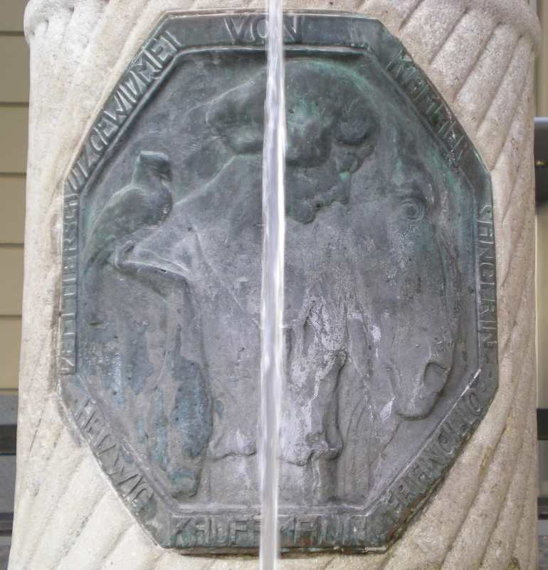 Der Tiertränkebrunnen in der Gumpendorfer Straße nahe der Rahlstiege in Wien-Mariahilf. Die Plakette weist auf die Stifterin, Kammersängerin Hedwig Kauffmann-Francillo hin